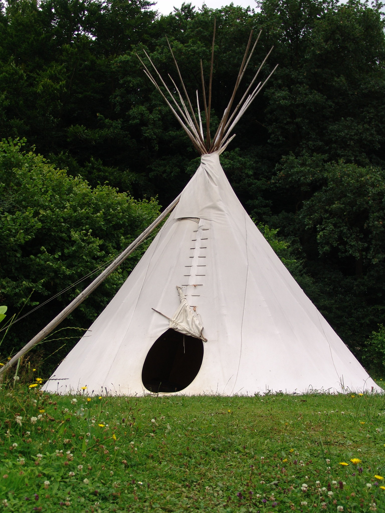 tipi bij daglicht